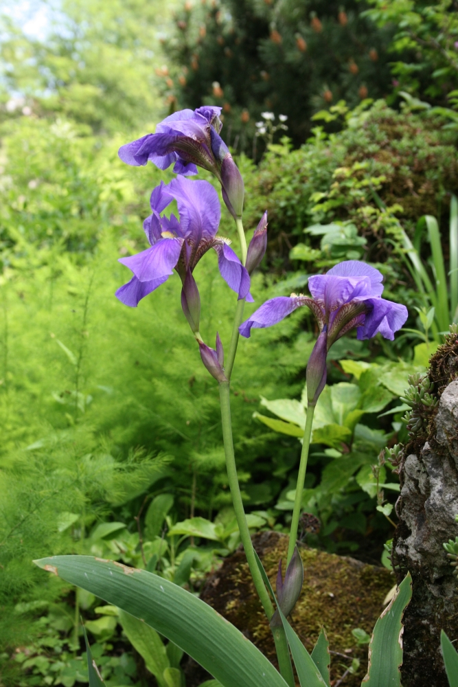 Iris croatica (hrvatska perunika), snimljeno u Botaničkom vrtu u Zagrebu.